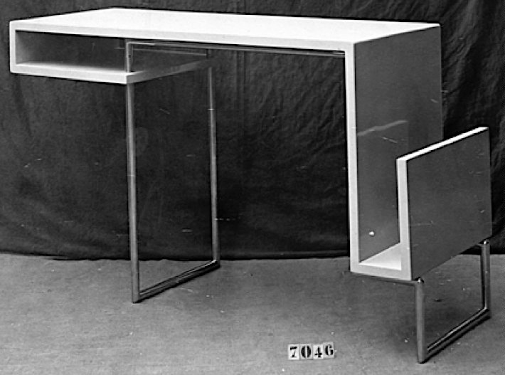 rcel, Bureau